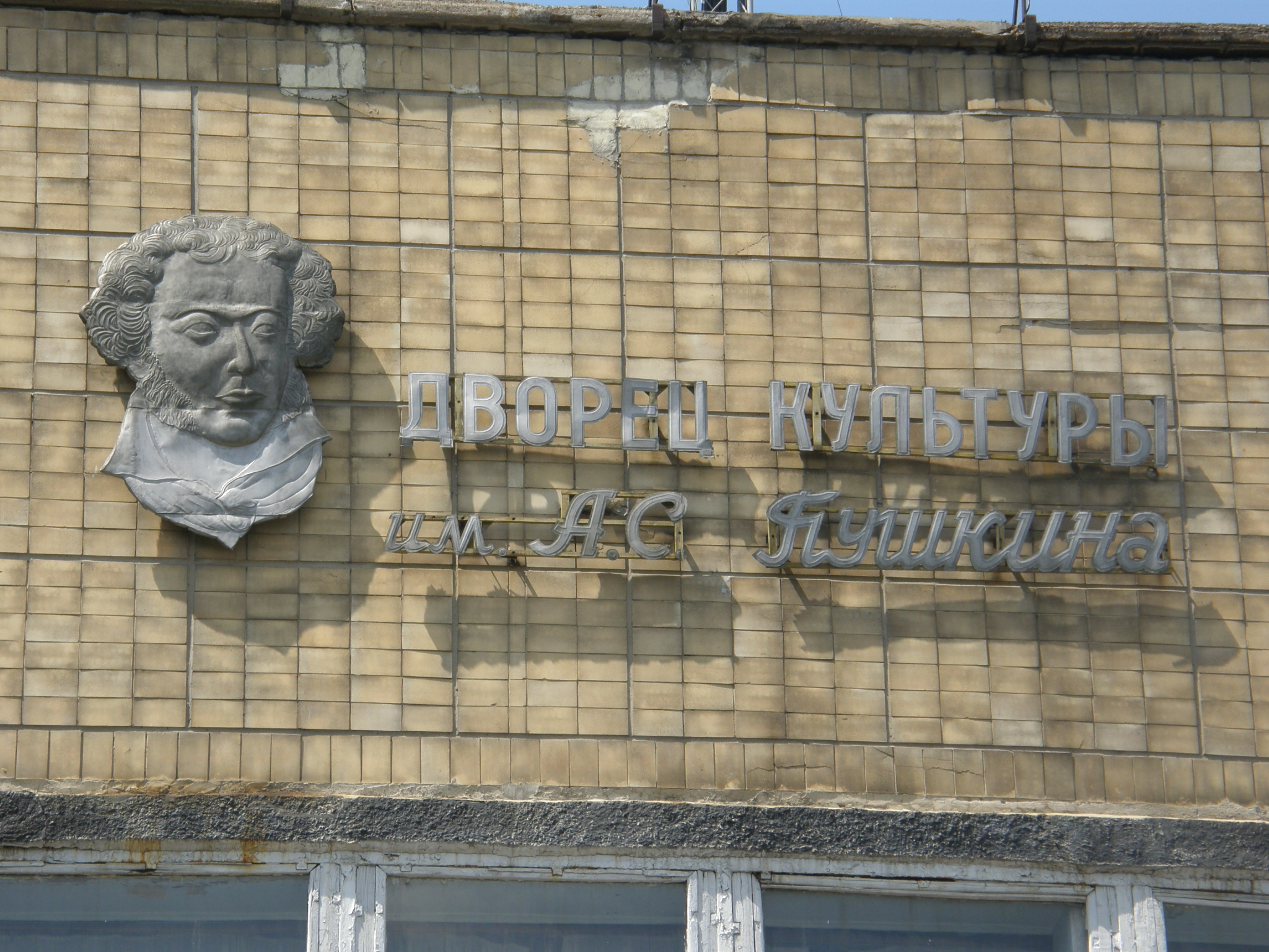 Донецк. Дворец культуры имени Пушкина